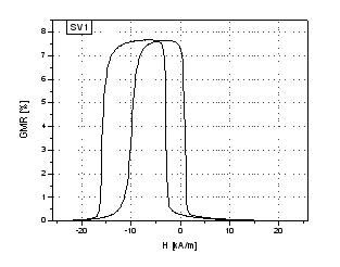 GMR - zawór zspinowy